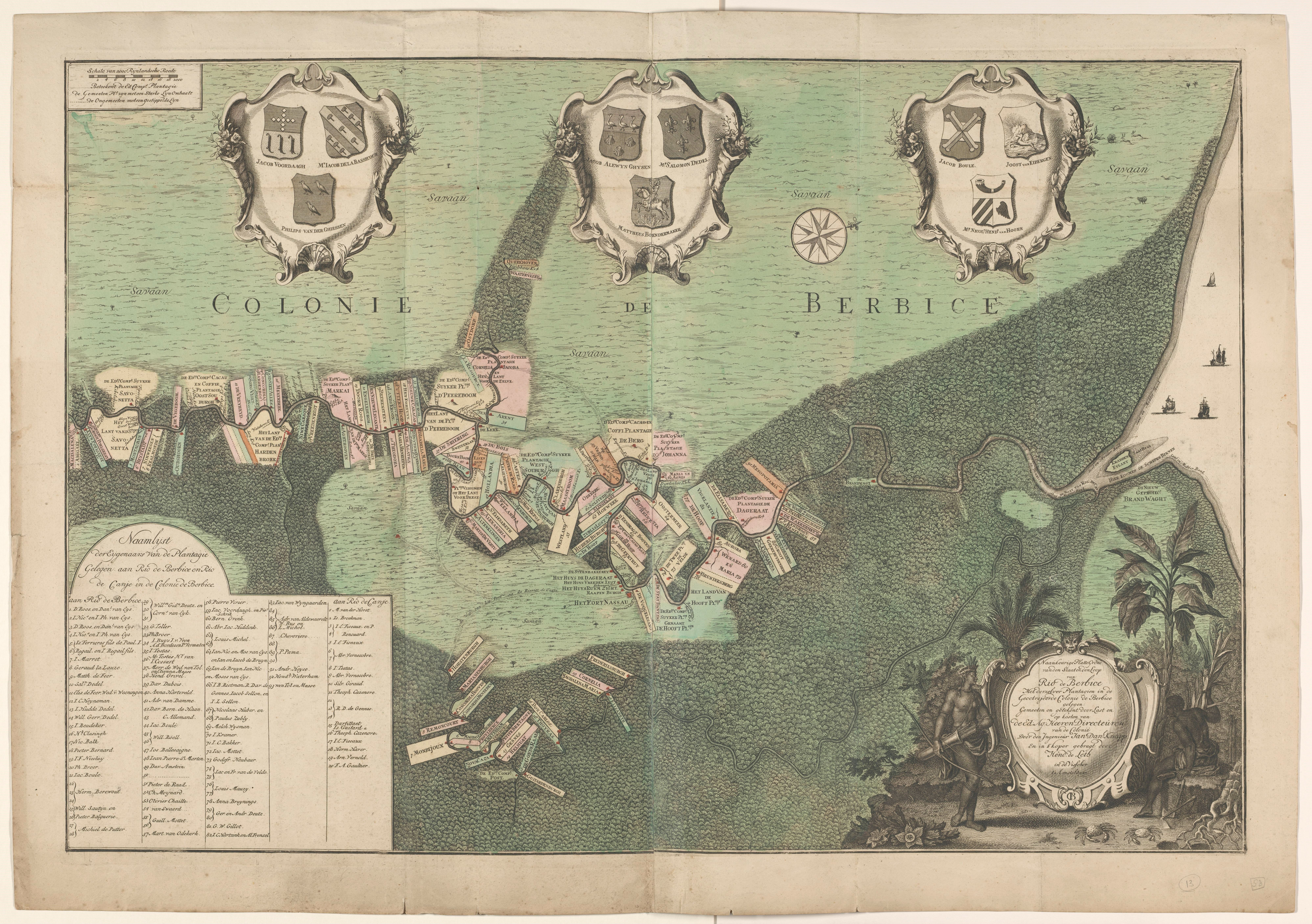 Naauekeurige Plattegrond van den Staat en den Loop van Rio de Berbice. Met derzelver Plantagien in de Geoctroyeerde colonie de Berbice gelegen Landkaart van twee aan elkaar geplakte vellen van de Nederlandse WIC-kolonie Berbice, met aangegeven de plantages langs de rivieren Berbice en Canje. Linksonder: "Naamlijst der Eigenaars van de Plantagie Gelegen aan Rio de Berbice en Rio de Canje in de colonie de Berbice": totaal 113 nummers. Boven: drie cartouches met elk drie wapenschilden. Rechtsonder: titelcartouche met een inheemse bewoner van Guyana en een tot slaaf gemaakte man. Linksboven de schaal. Vervaardiger cartograaf: Jan Daniël Knapp (vermeld op object) prentmaker: Hendrik de Leth (vermeld op object) uitgever: Hendrik de Leth (vermeld op object) opdrachtgever: Directeuren van de kolonie Berbice (vermeld op object) Plaats vervaardiging Amsterdam Datering1742